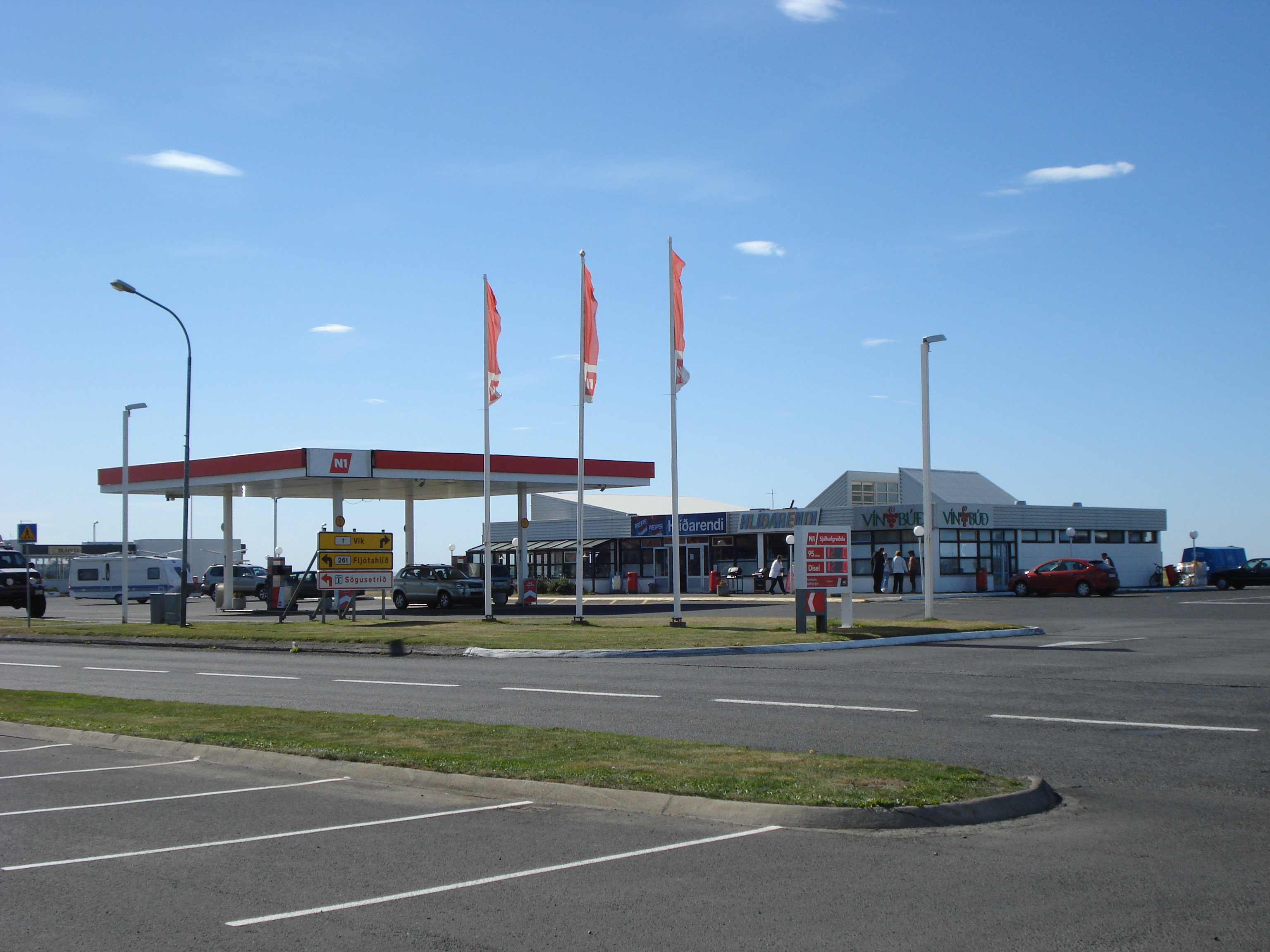 Gas station in Hvolsvöllur, Iceland